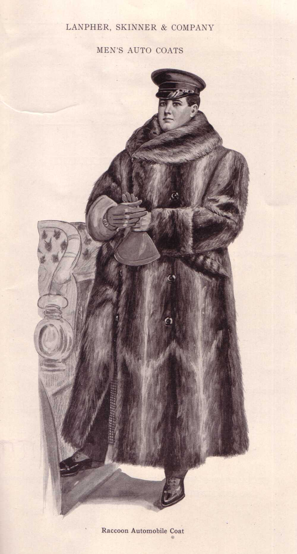 Fur Retail Trade Lanpher Furs, Raccoon Automobile Coat. Autofahrer-Mantel aus Waschbär-Fellen (Pelz)